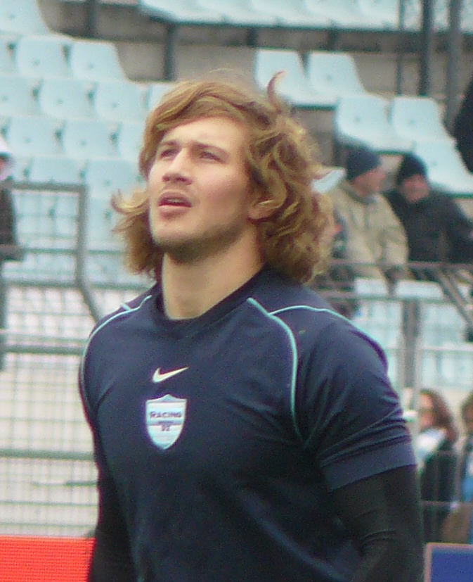 François Steyn, arrière au Racing Métro 92, lors du match contre le CS Bourgoin-Jallieu, le 3 janvier 2010 à Colombes.